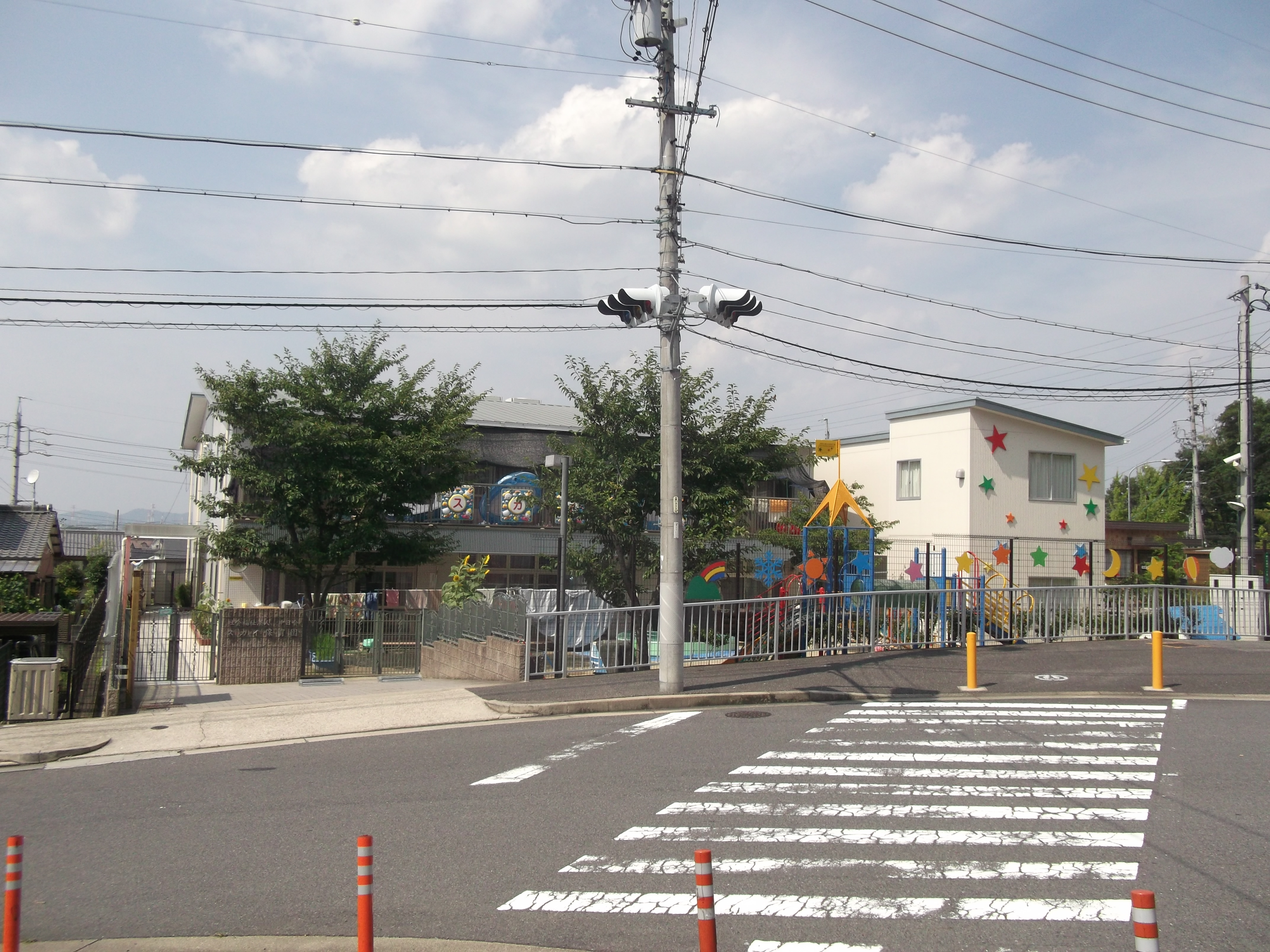 名古屋市守山区桔梗平のスカイ保育園を南側公道西側より撮影